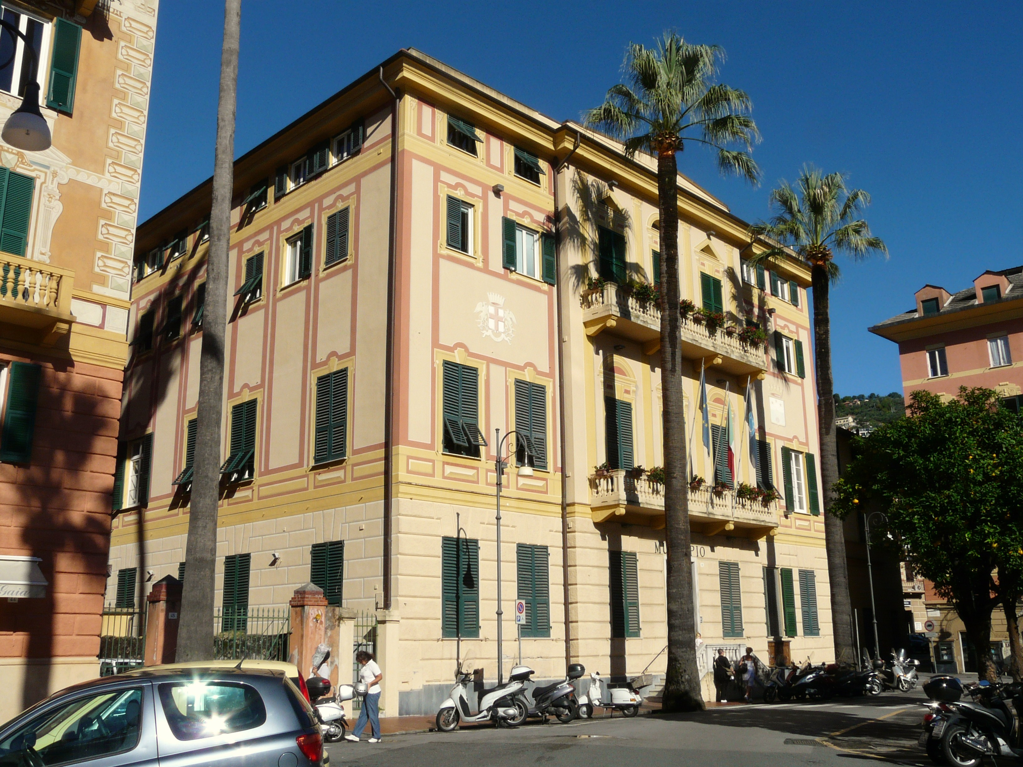 Municipio di Santa Margherita Ligure, Liguria, Italia